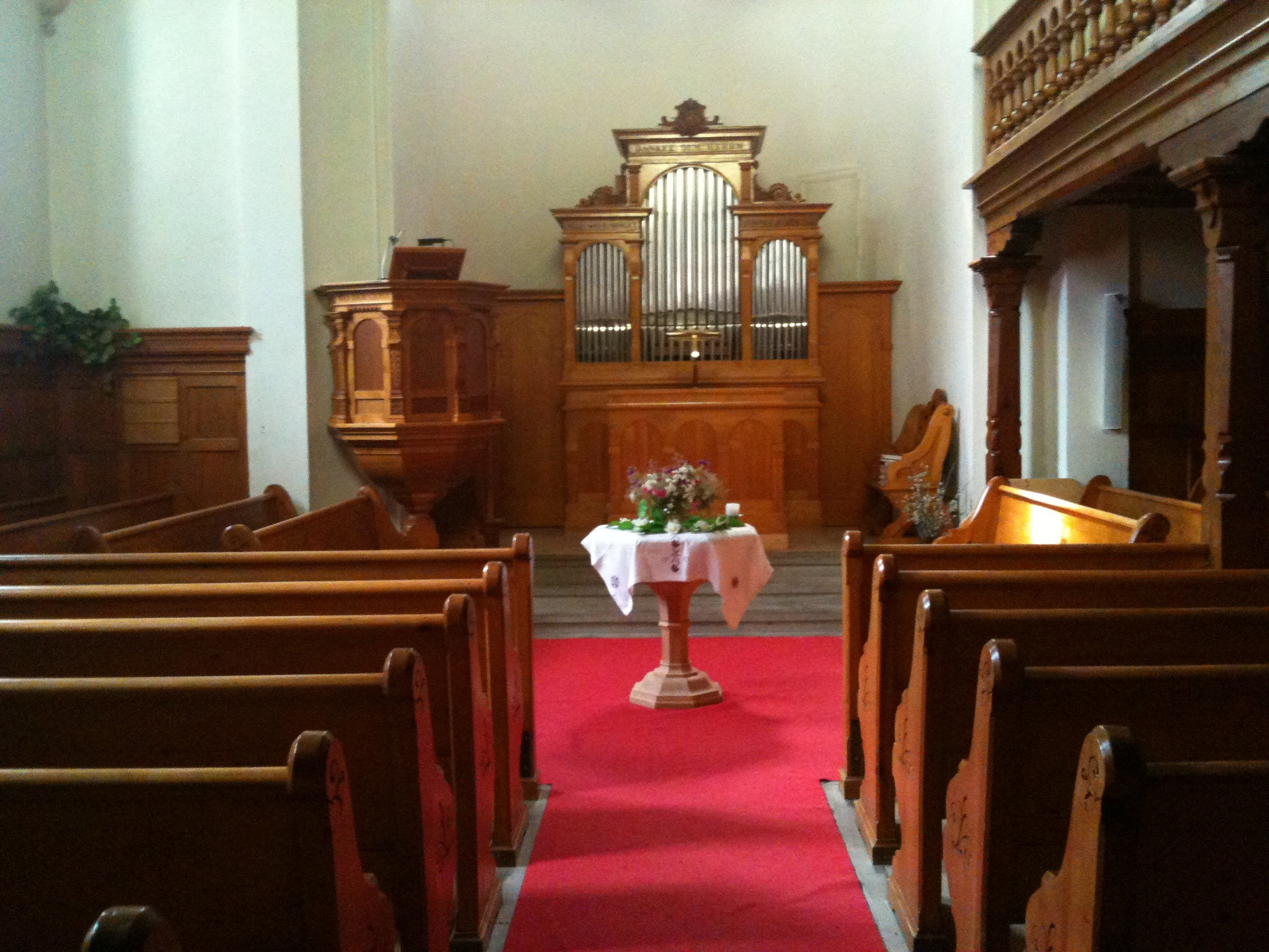 reformierte Kirche Davos Monstein, Kanton Graubünden